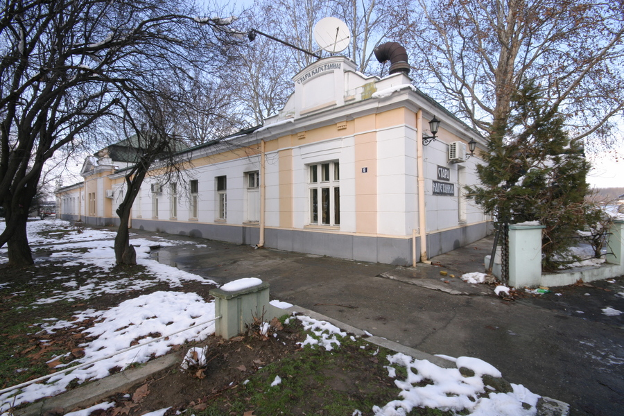 Srpski (latinica): Stara kapetanija u Zemunu je nepokretno kulturno dobro koje se nalazi u Zemunu. Podignuta je 1908. godine za parobrodnu putničku stanicu.